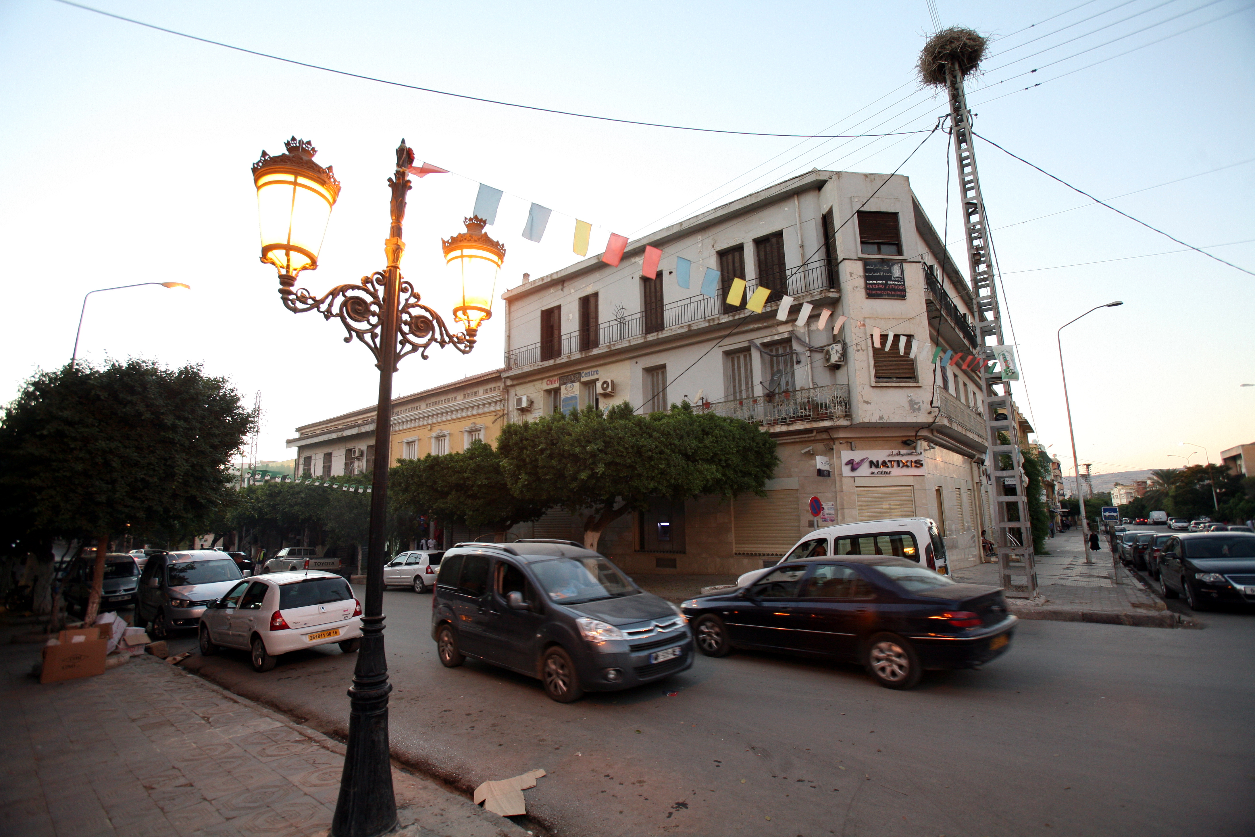 Croisement de la rue du 20 août (ex rue Jean Jaurès) et de la rue Azzoun (ex rue d'Illens) à Chlef (ex Orléansville), Algérie.